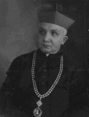 Bartoloměj Kutal (1883-1964), katolický kněz, badatel v oblasti exegese Starého zákona, profesor teologické fakulty v Olomouci